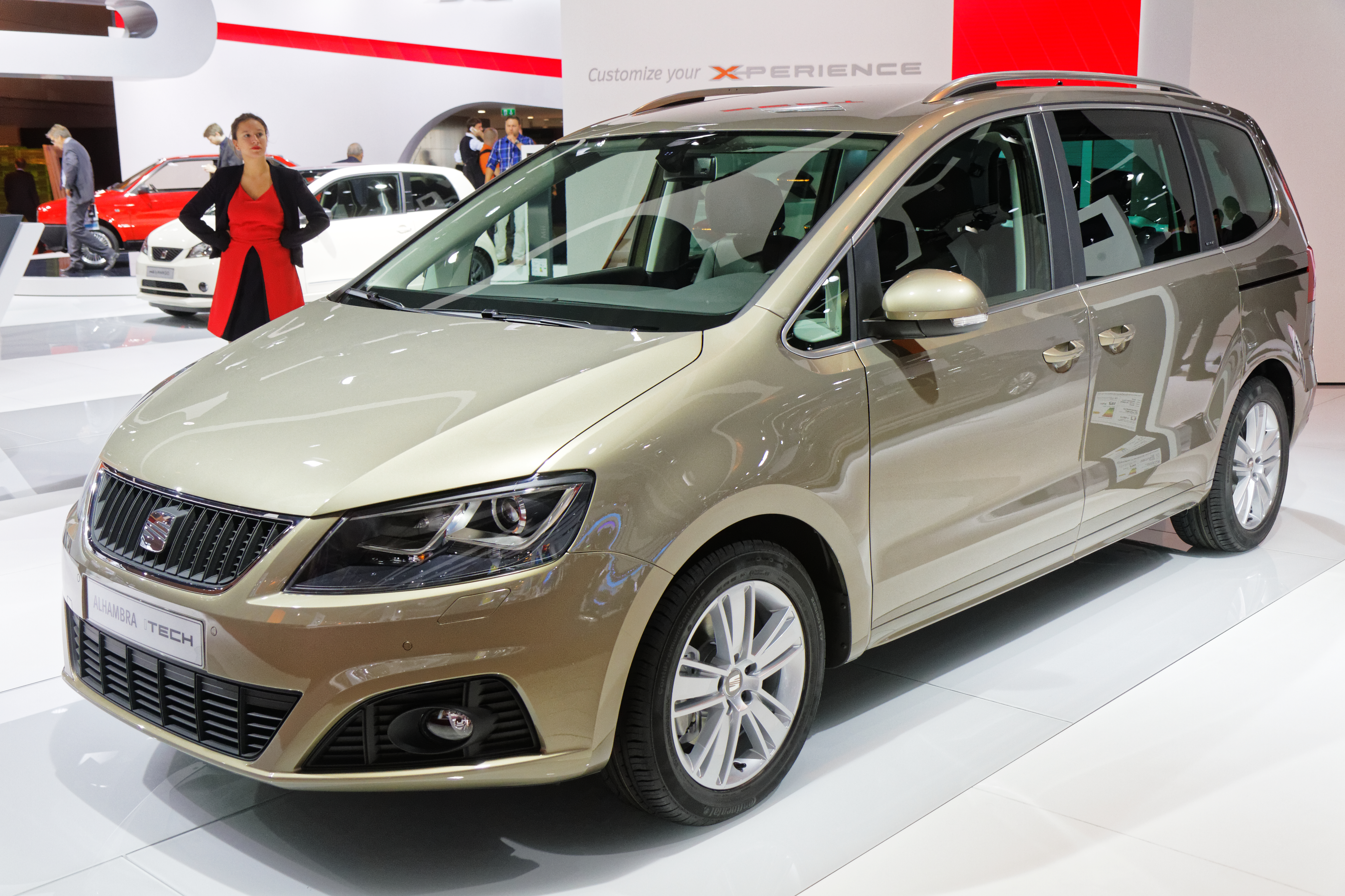 Une Seat Alhambra présentée lors du mondial de l'automobile de Paris 2014.